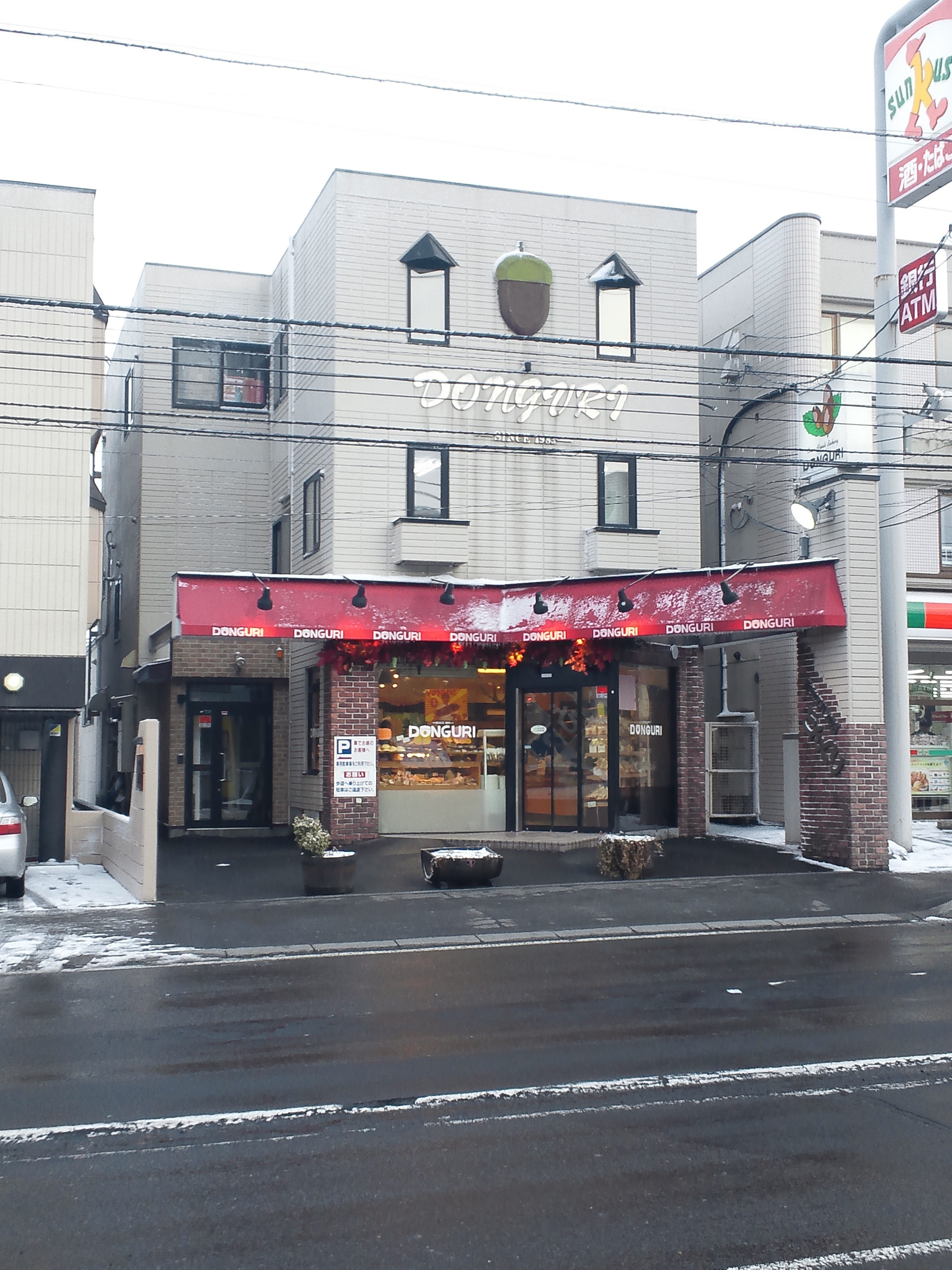 北海道札幌市白石区に所在するパン屋どんぐり（本店）